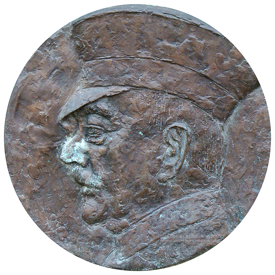 Dietrich Capler von Oedheim gen. Bautz, Portraitmedaillon auf seinem Grabmal auf dem Friedhof in Oedheim